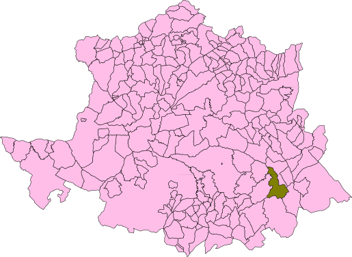 Berzocana